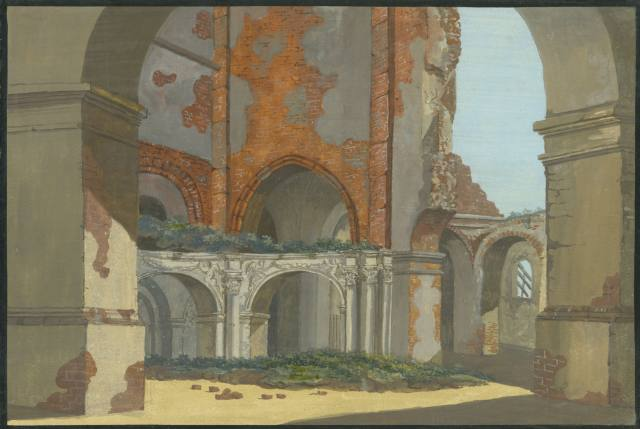 Poznań Collegiate by Alberti